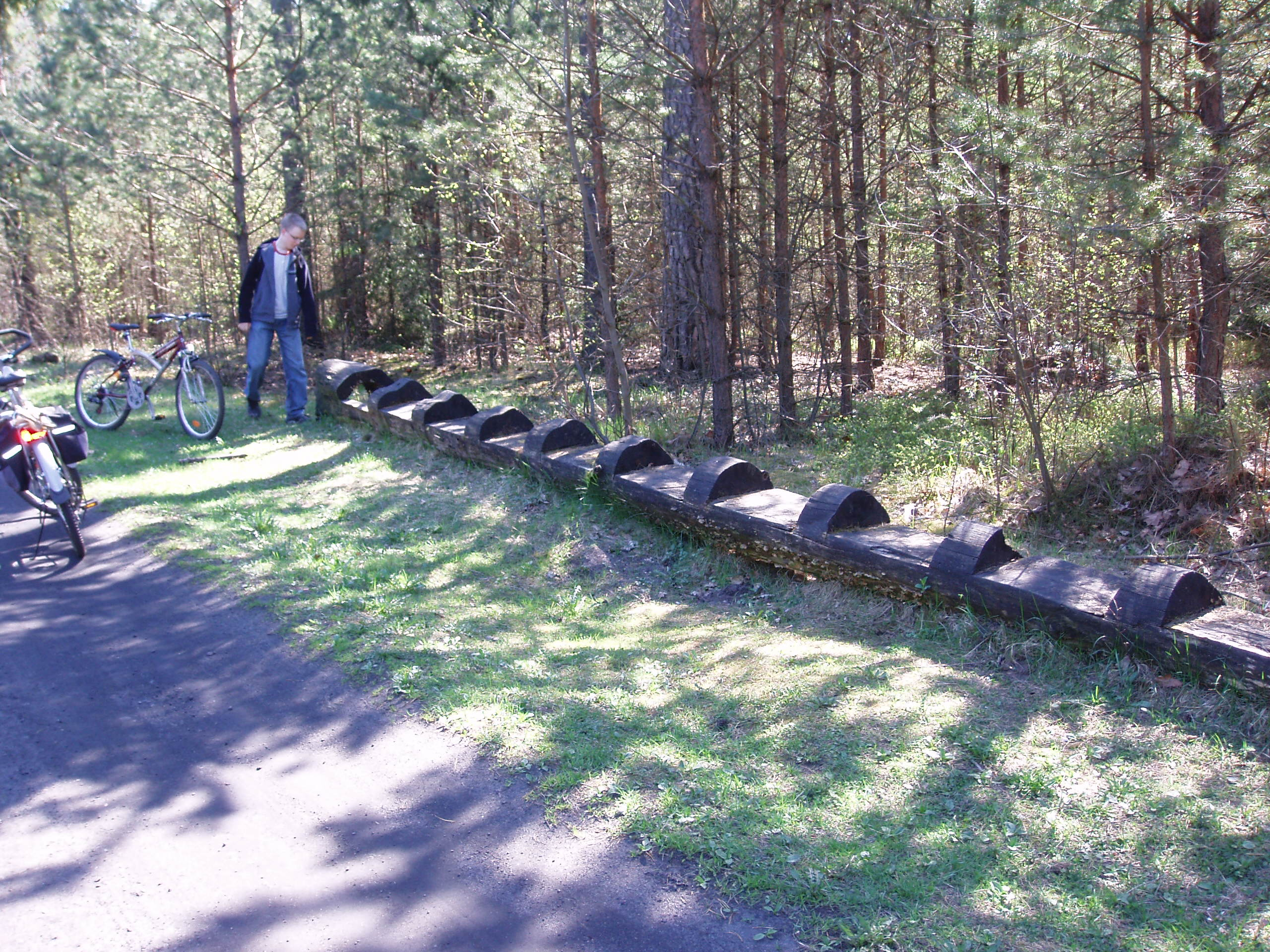 Drewniana ławka w Lesie Miejskim, Olsztyn